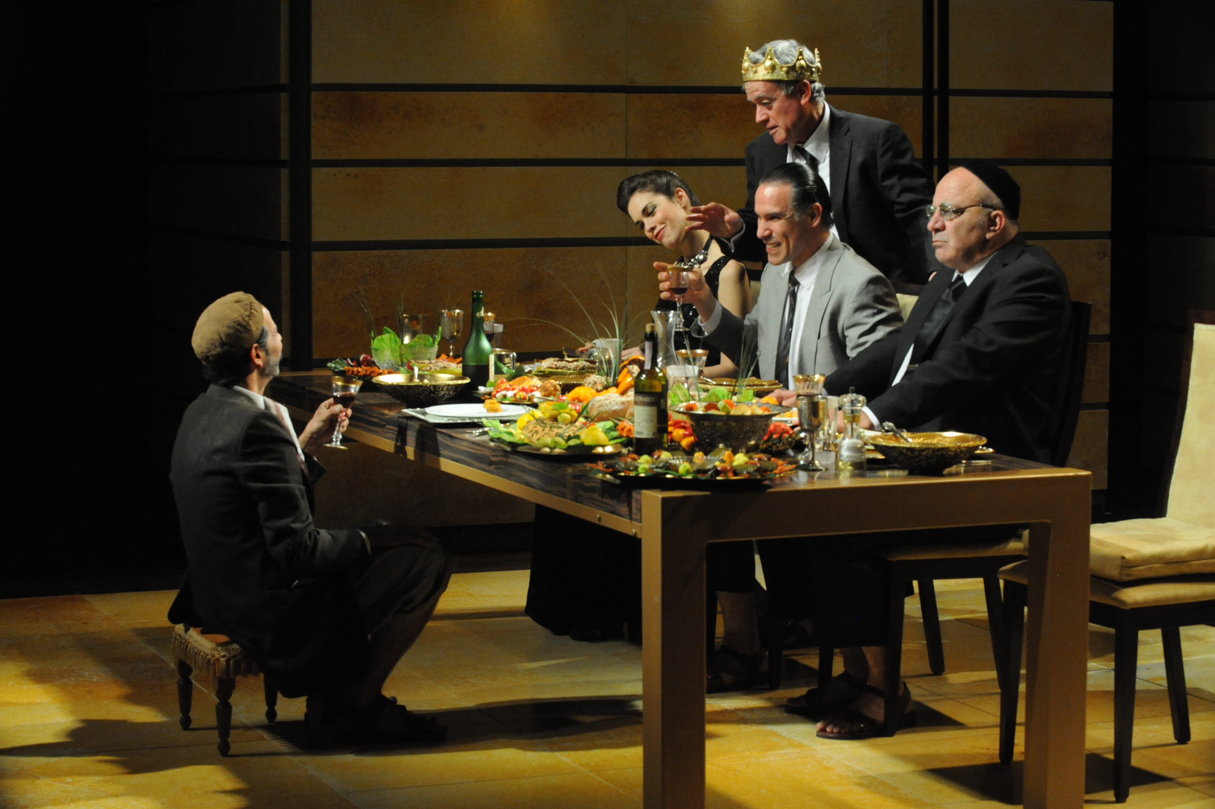 ההצגה "אוכלים" בבימויו של מיקי גורביץ', תיאטרון החאן, 2011